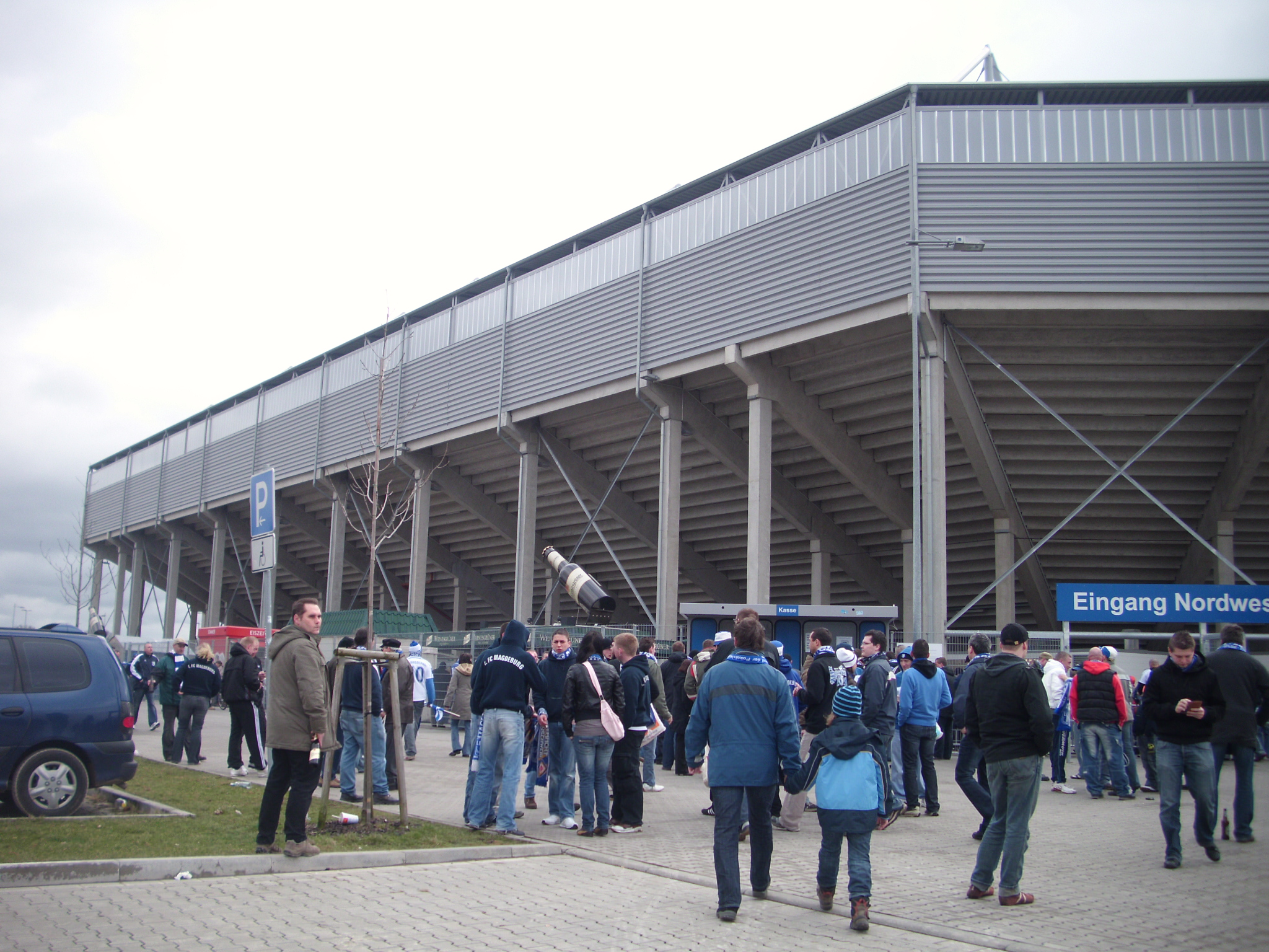 Fassade des Magdeburger Stadions.